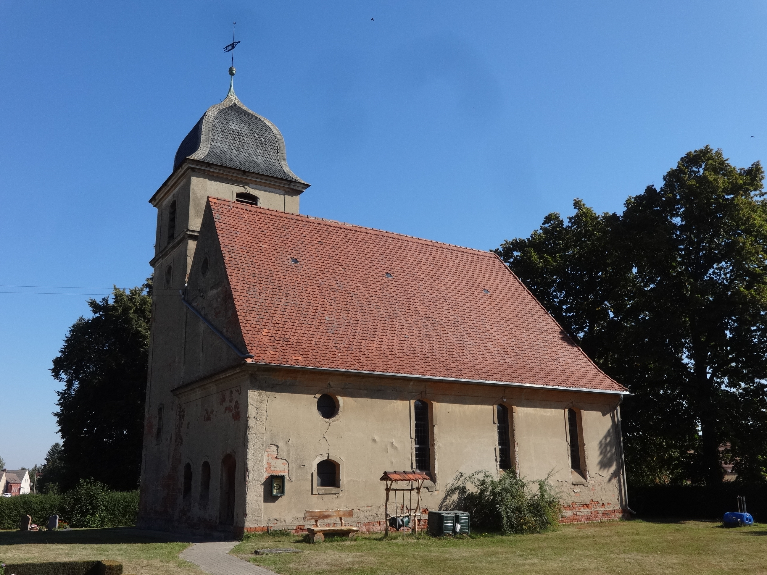 Die Dorfkirche in Niendorf, Gemeinde Ihlow (Fläming) wurde im 18. Jahrhundert auf dem Sockel eines Vorgängerbaus errichtet. 1908 wurde sie von der Kirchengemeinde neobarock überformt. Im Innern befinden sich unter anderem ein Altar sowie eine Kanzel aus dem 18. Jahrhundert.